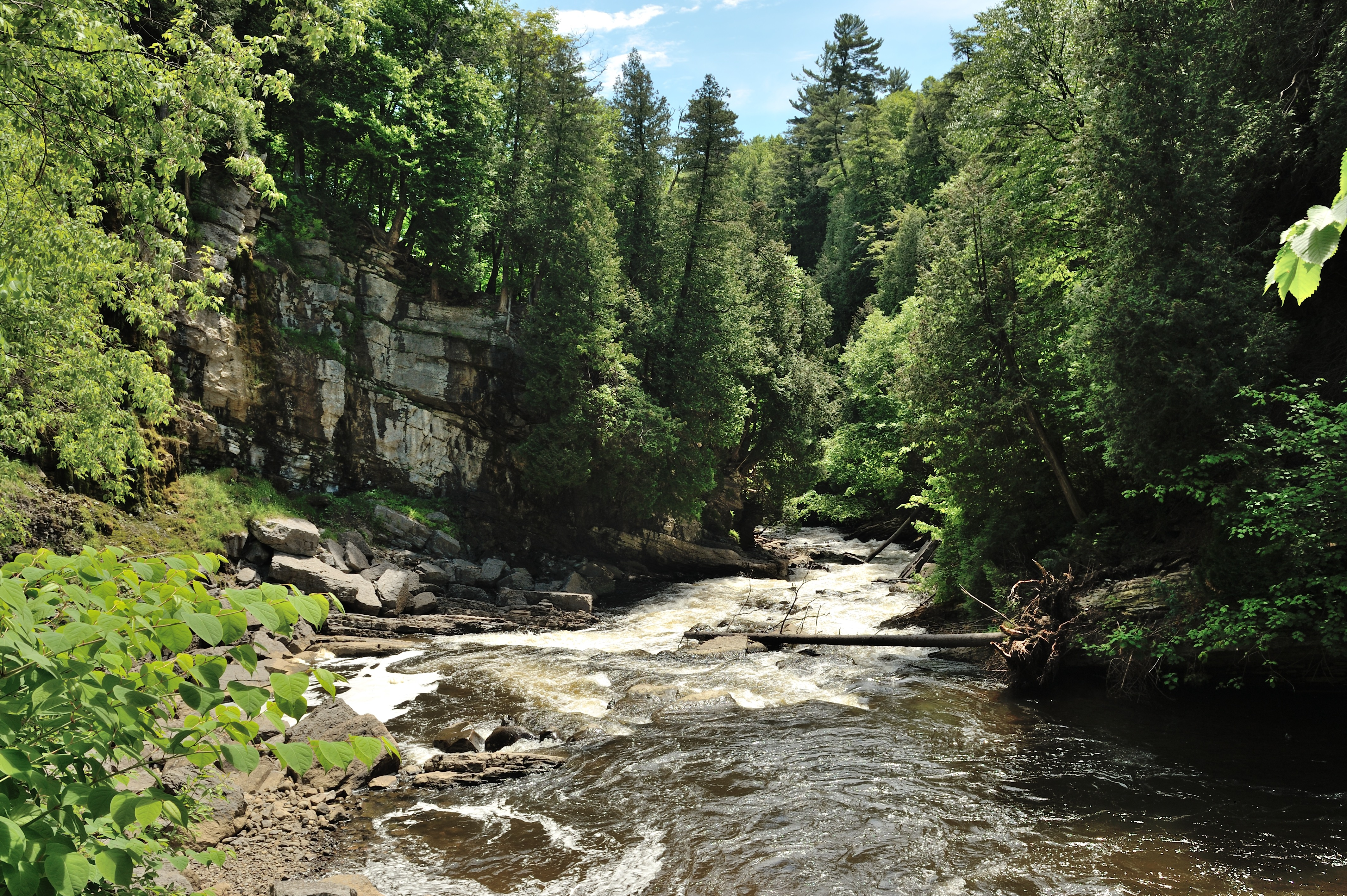 Située dans la municipalité de Loretteville à Québec, les visiteurs peuvent parcourir les sentiers, et depuis ses belvédères, observer la chute Kabir Kouba et le canyon. Village de Wendake: Nation huronne - wendat.